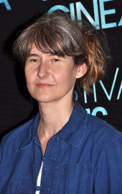 Laetitia Masson au festival "Paris cinéma"